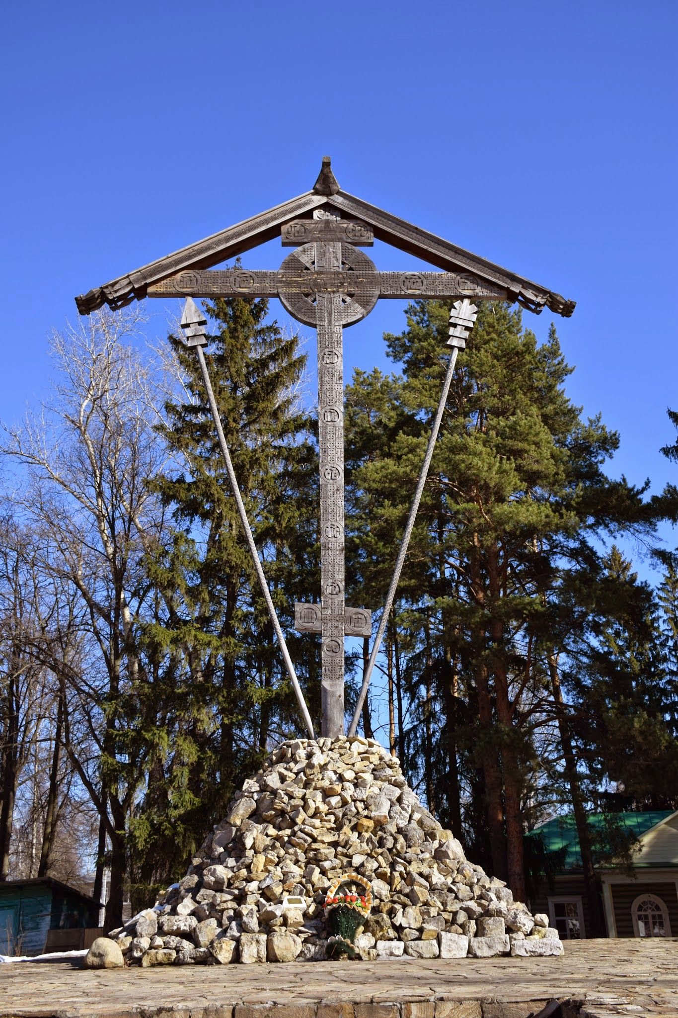 Бутовский полигон: Юбилейная улица, Дрожжино, Ленинский район, Московская область